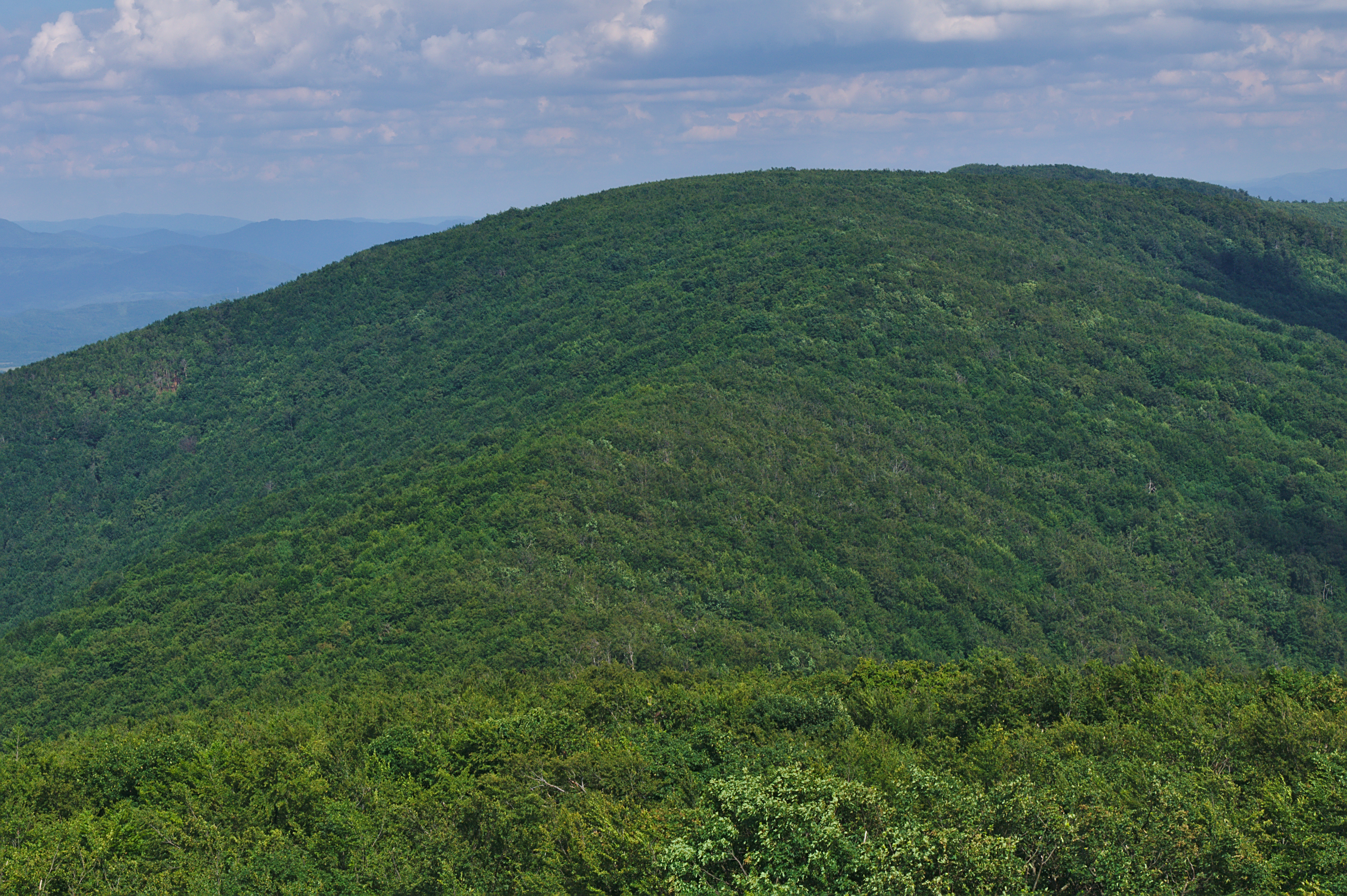 Prírodná pamiatka Sninský kameň - pohľad na Nežabec, CHKO Vihorlat